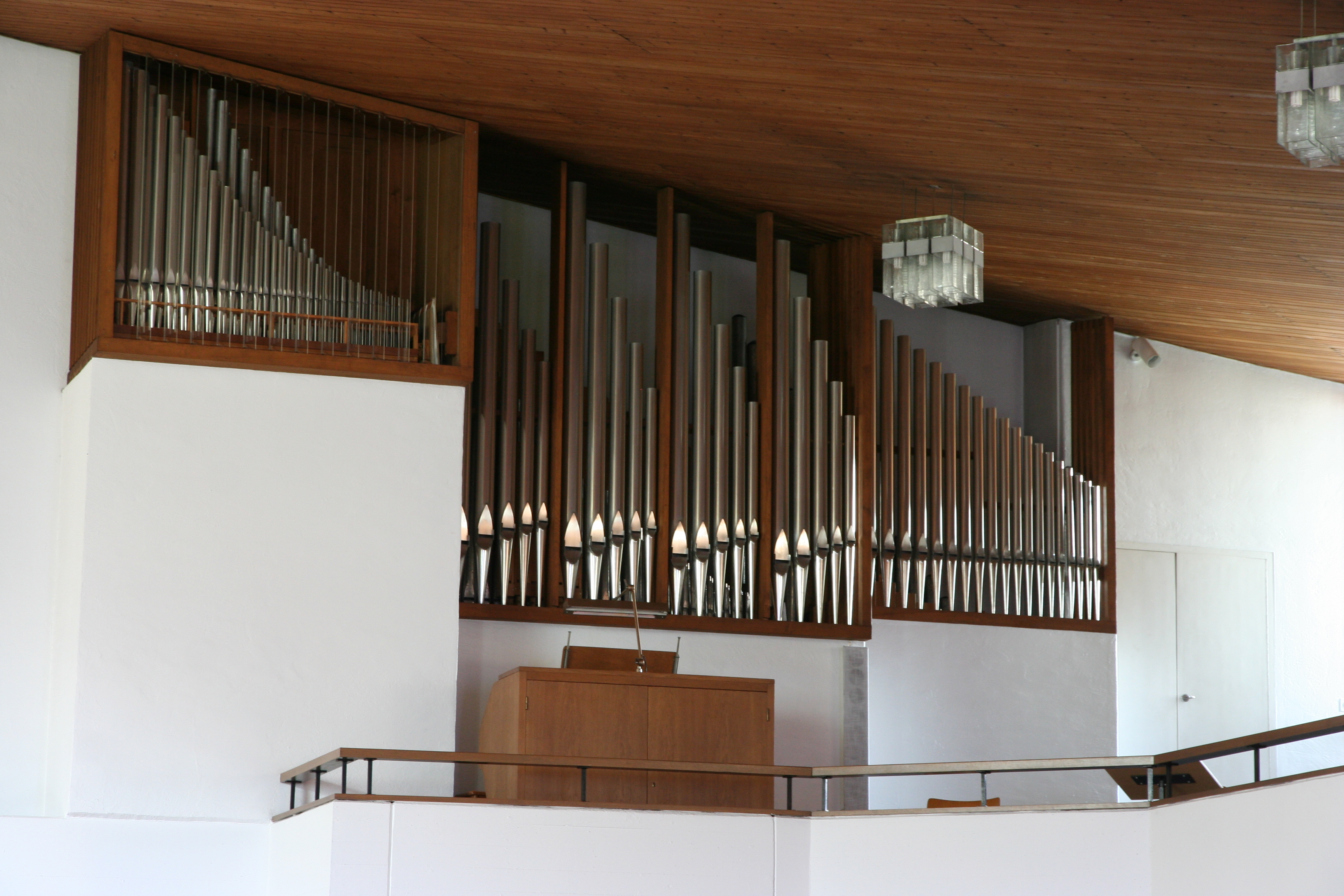 Römisch-katholische Pfarrkirche Heiligkreuz in Künten AG